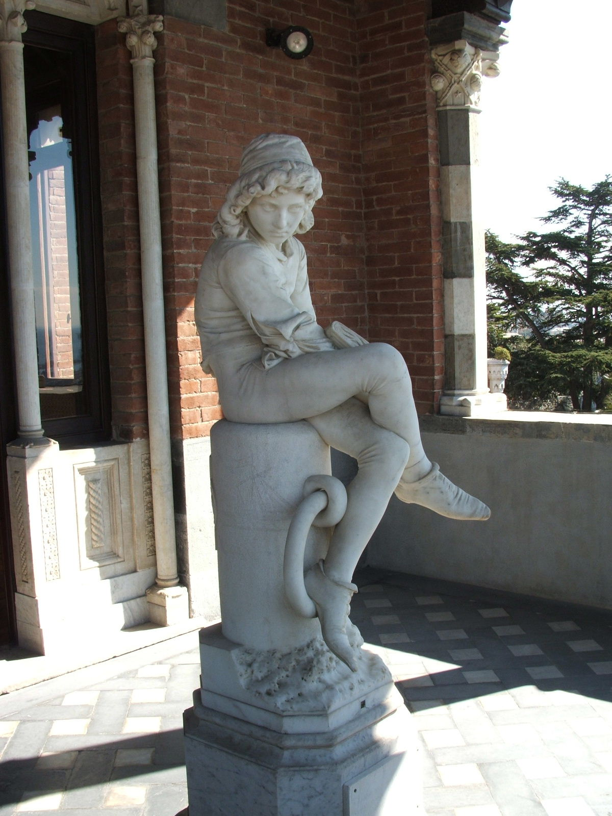 Genova, Castello d'Albertis, Museo delle Culture del Mondo - Loggia, statua del "Colombo giovinetto", di Giulio Monteverde.